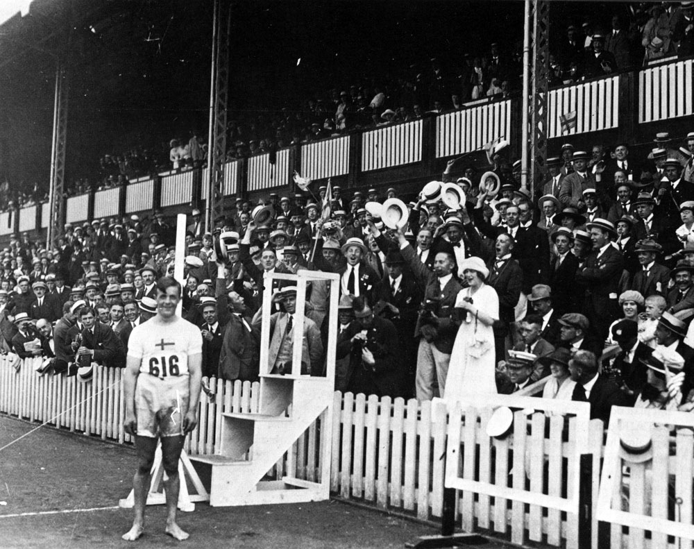 William Pettersson, längdhoppare